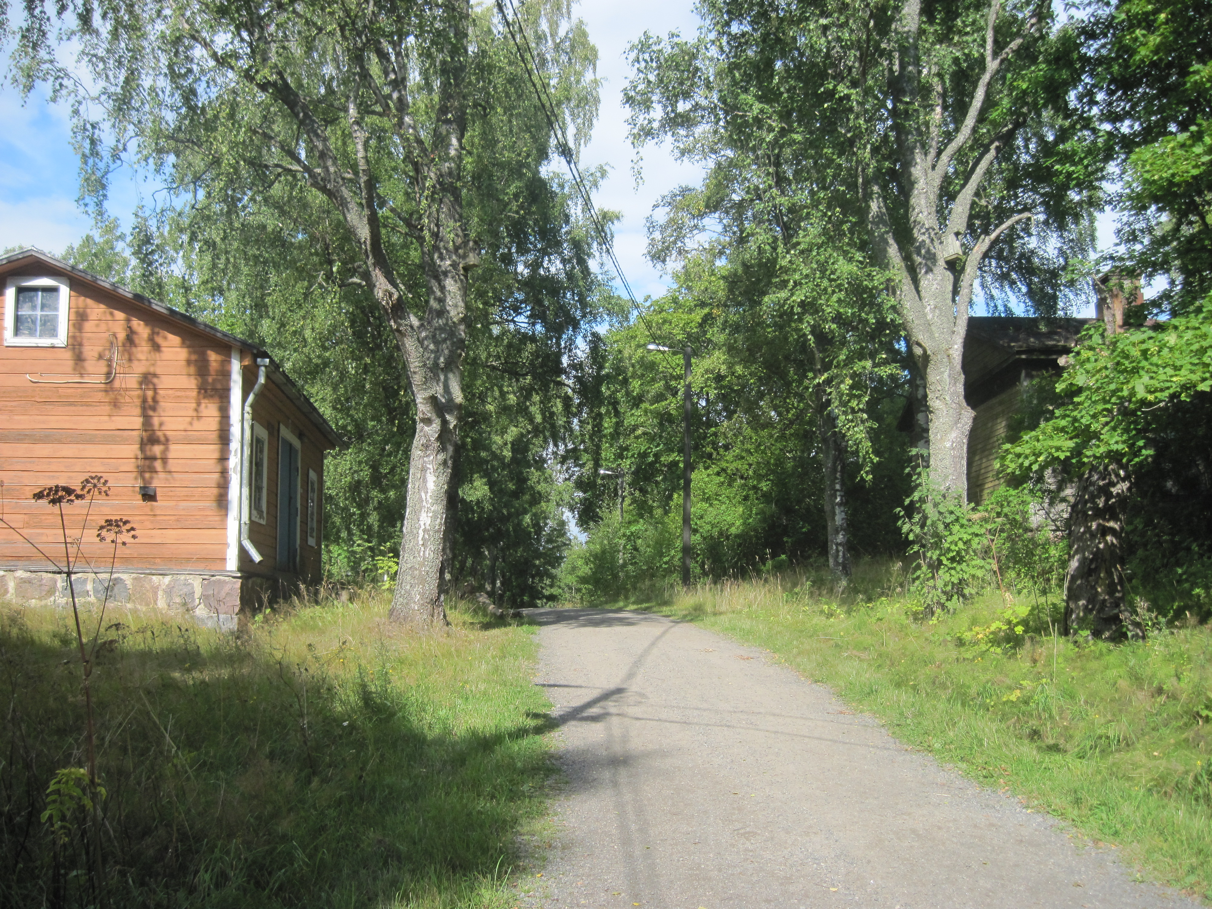 Vallisaaren vanha kylänraitti